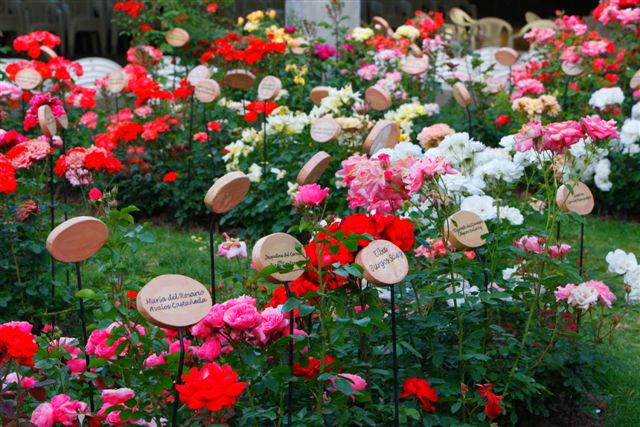 Jardín de rosas,una manera de honrar a las víctimas de violencia o represión de la dictadura